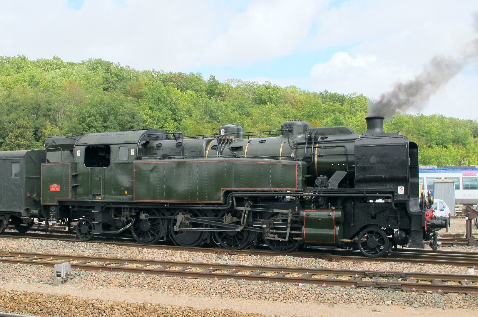 La 141 TD 740 en gare de Longueville le 18 septembre 2011.